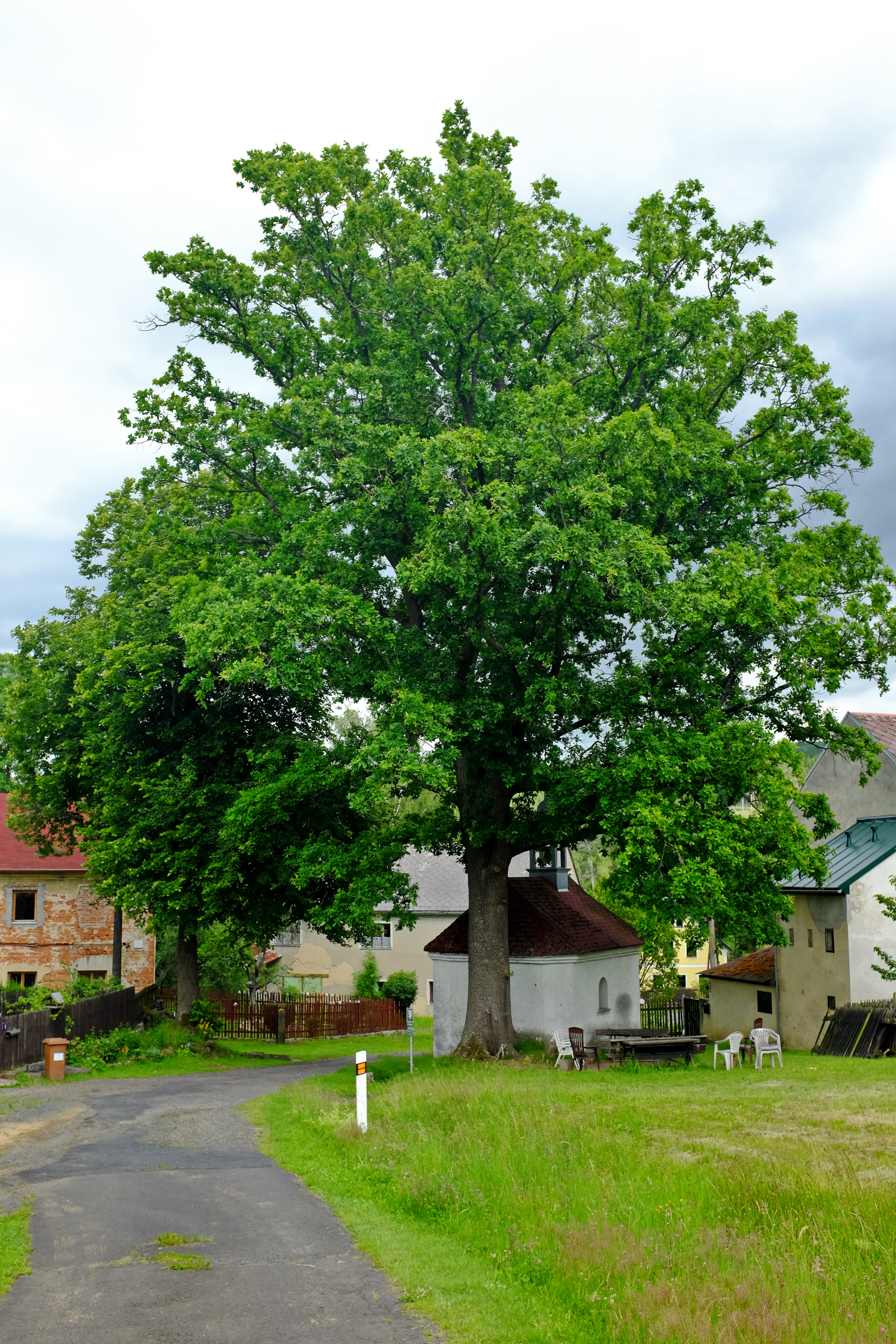 Památný strom - Dub u kaple v Číhané - Číhaná, část obce Bochov, okres Karlovy Vary